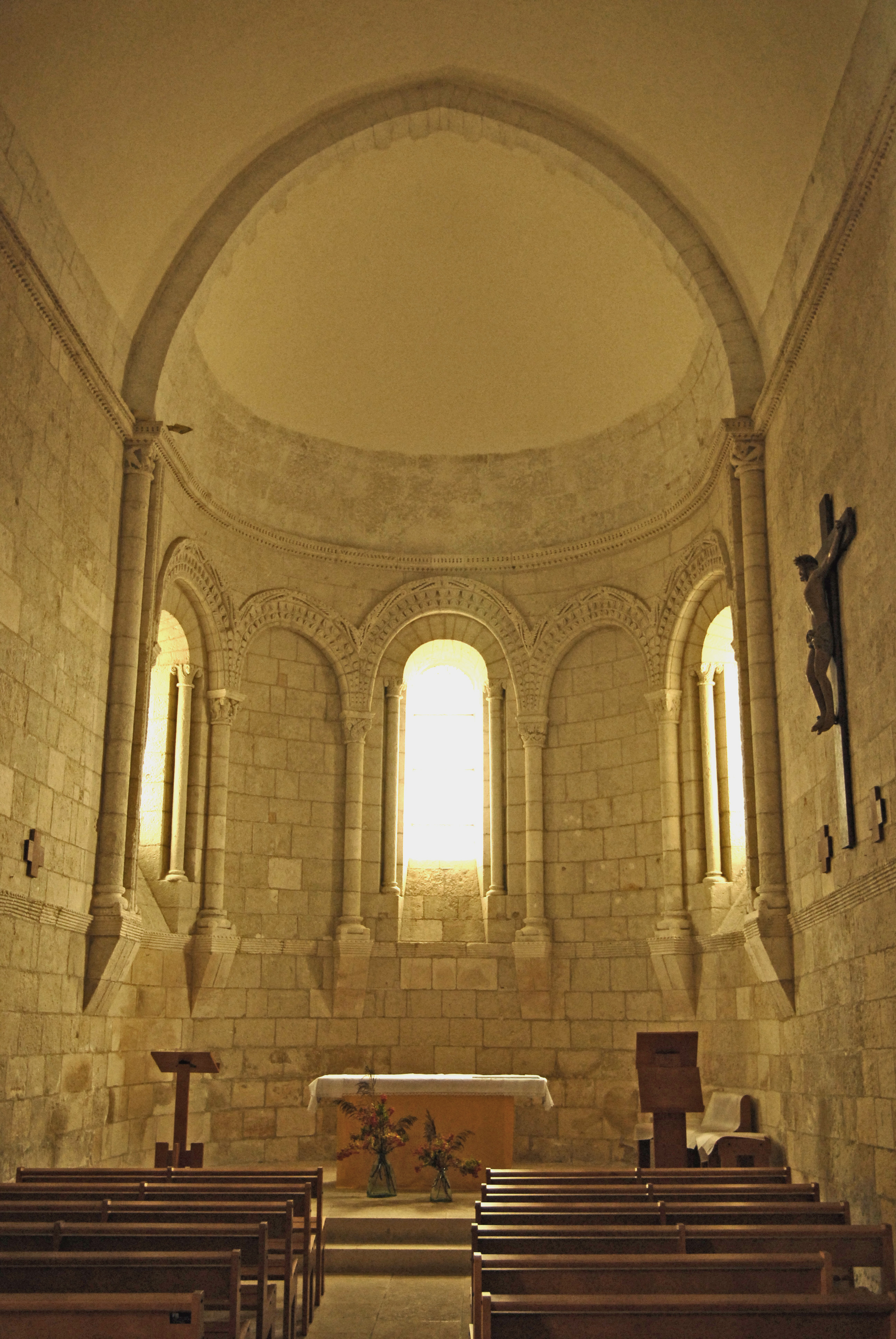 Sainte-Radegonde-Talmont-sur-Gironde, Chor